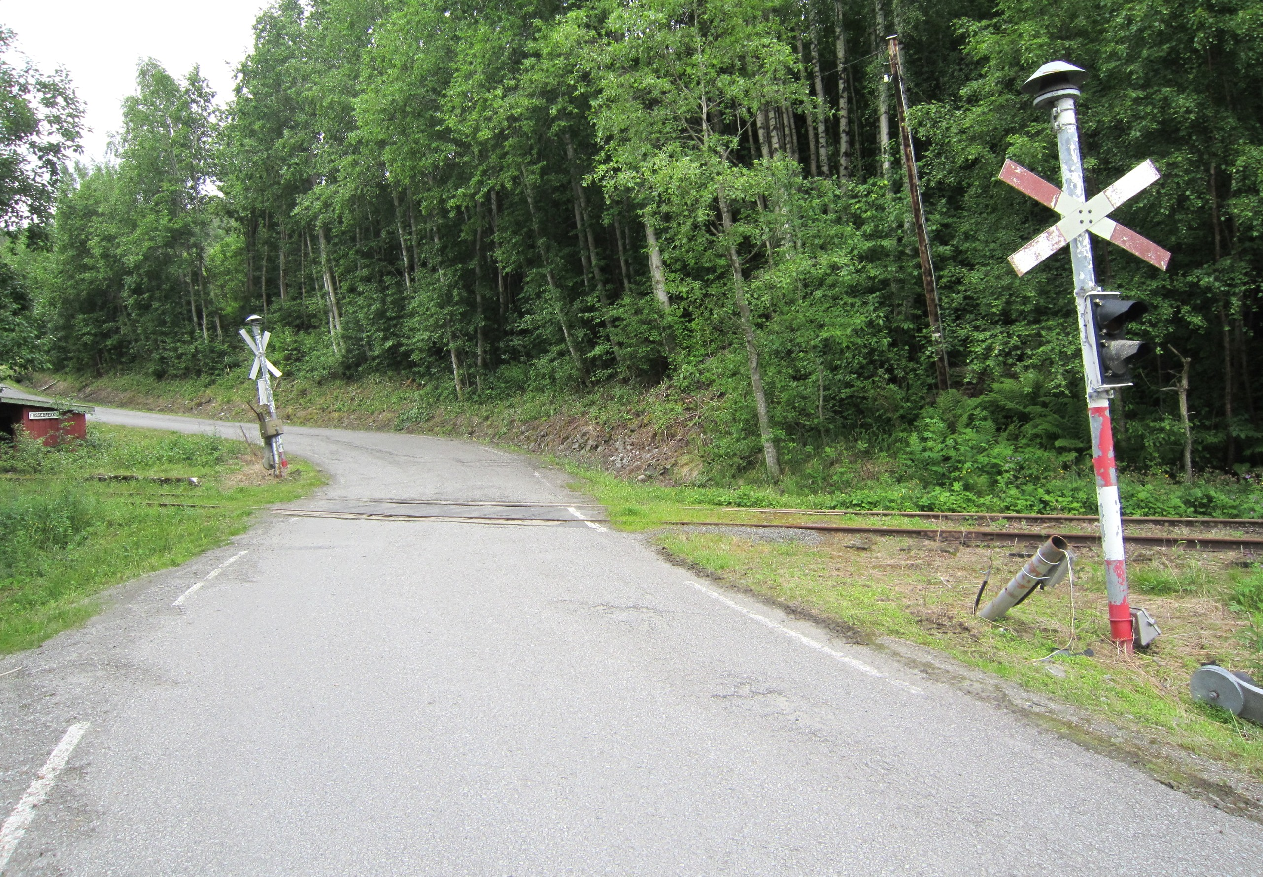 Fylkesvei 109 krysser Numedalsbanen ved Fossebrekke holdeplass.